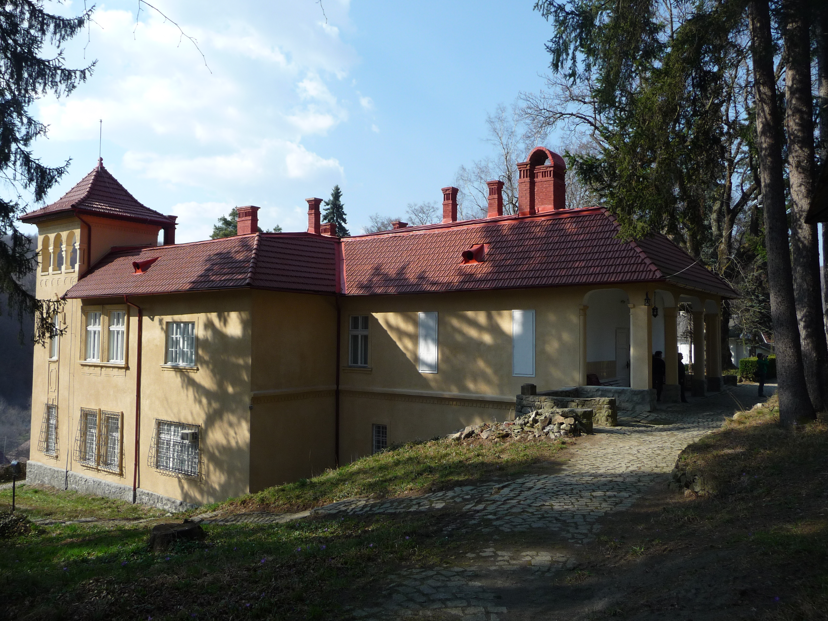 A csucsai kastély